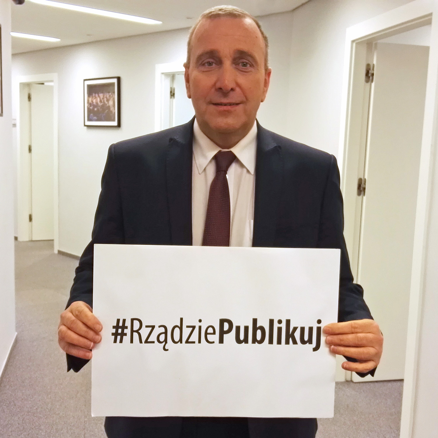 Przewodniczący Platformy Obywatelskiej Grzegorz Schetyna i akcja #RządziePublikuj.